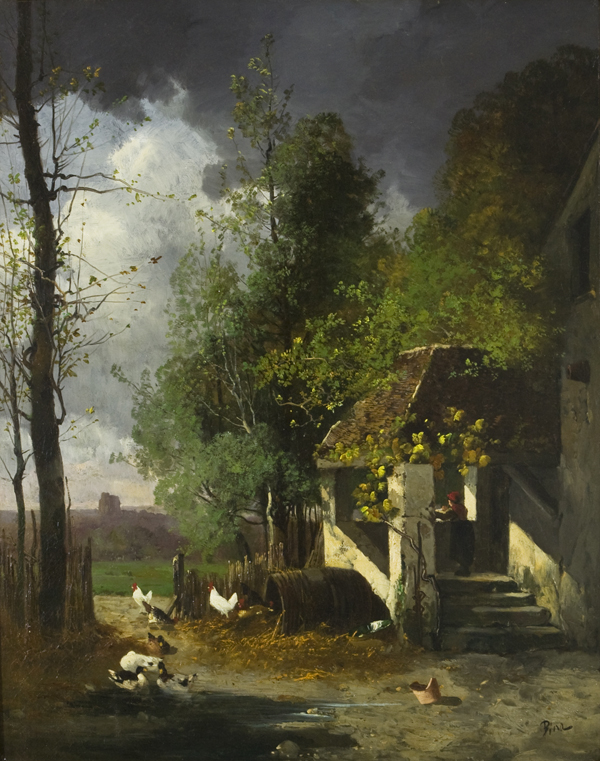 Le matin à Villeneuve l’Etang